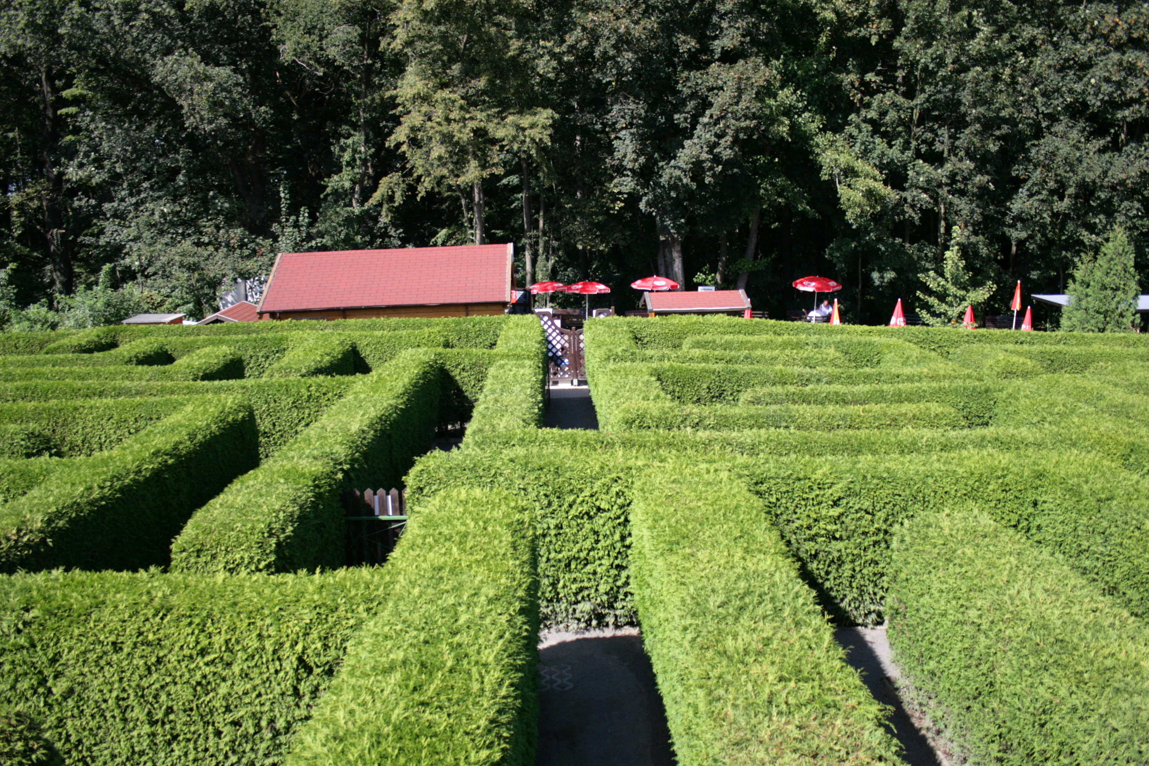 Irrgarten in Bautzen-Kleinwelka Hornjoserbsce: W Małowjelkowskim błudnišću